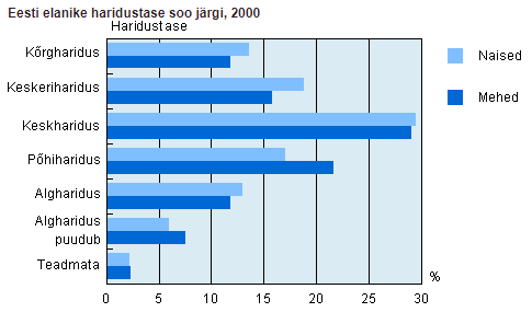 Eesti elanike haridustase soo järgi, 2000.a